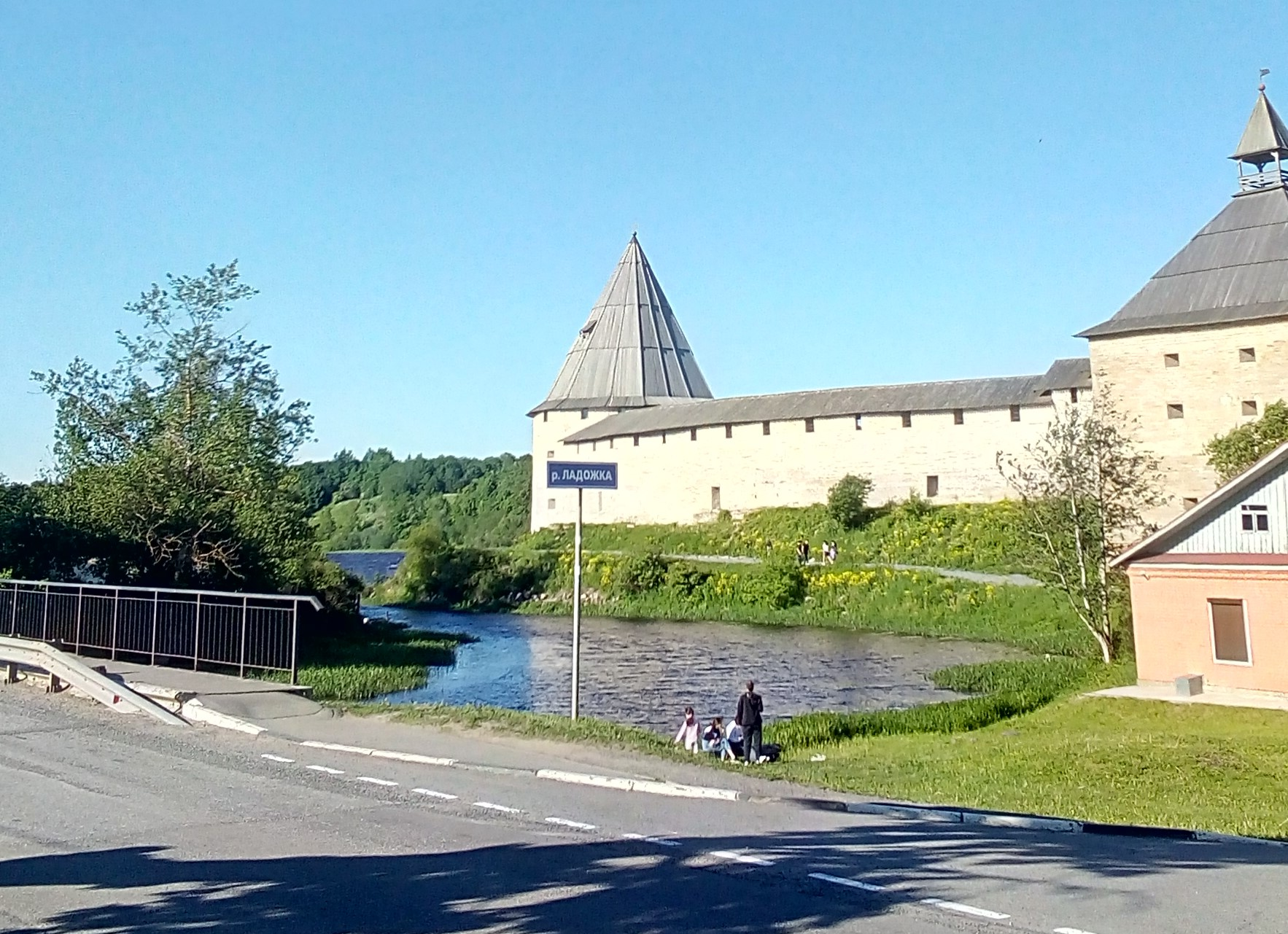 Река Ладожка у впадения в Волхов